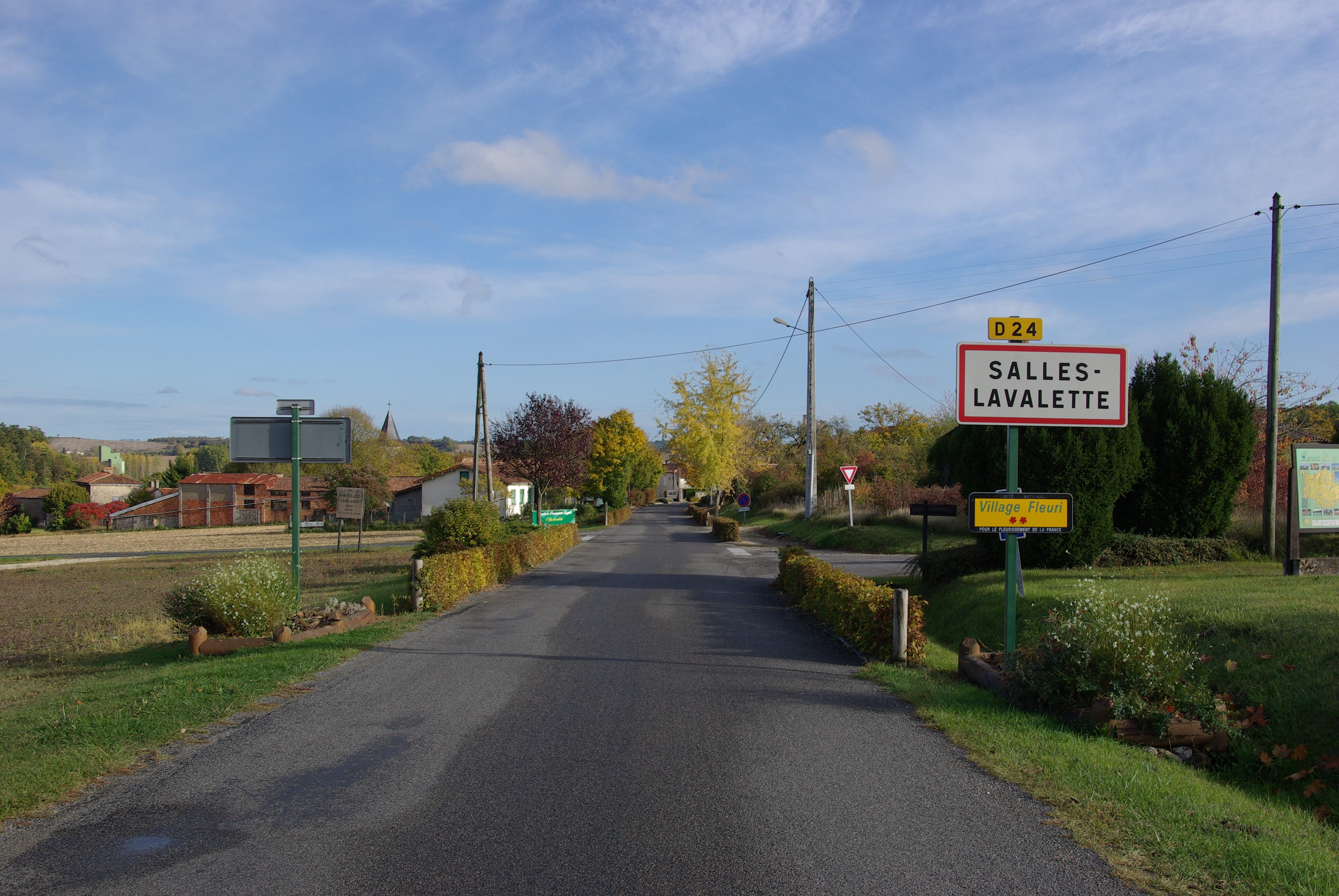 Entrée du bourg de Salles-Lavalette sur la D24. Charente, France.